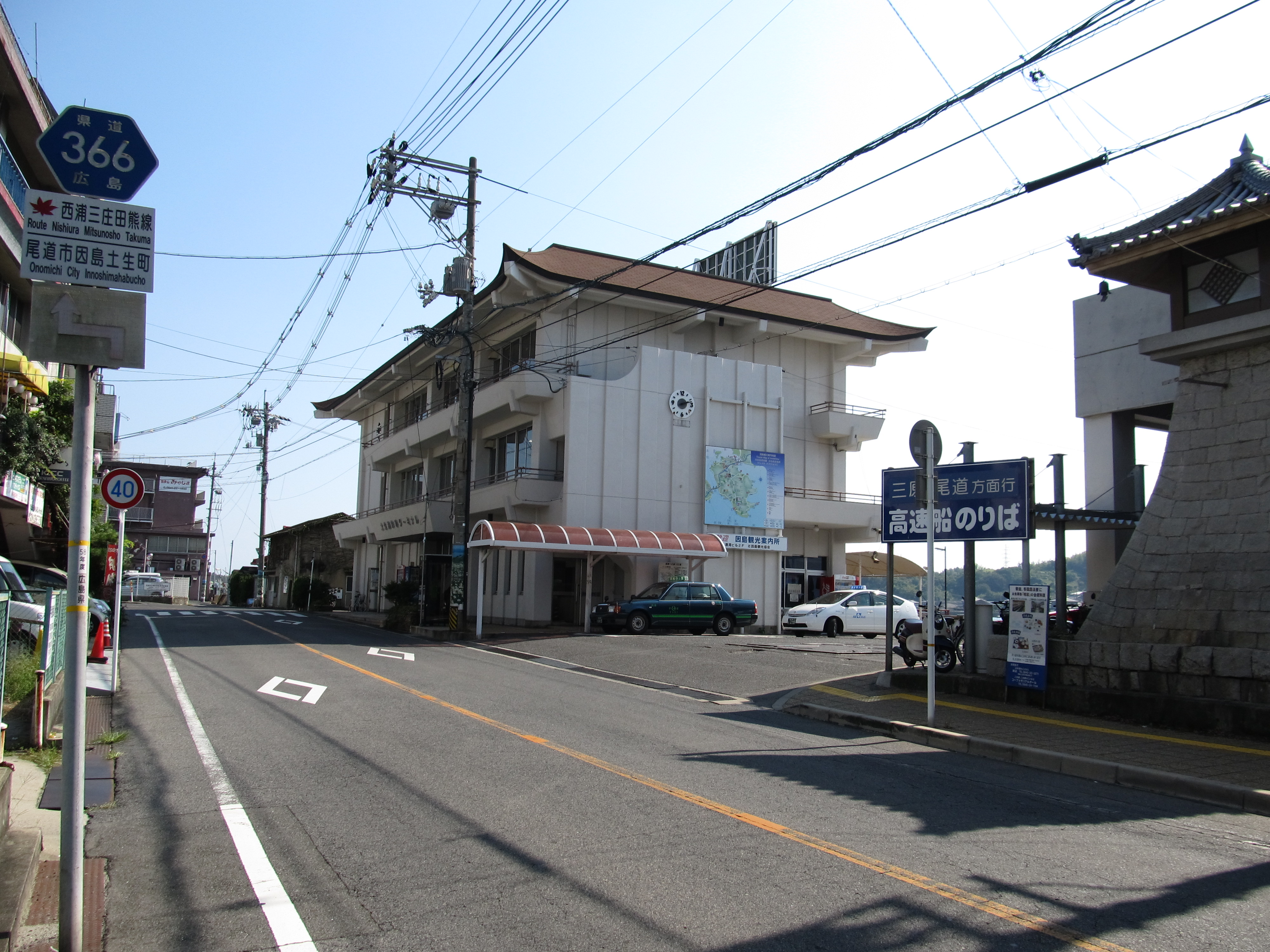 広島県尾道市の因島・土生港付近を通る広島県道366号西浦三庄田熊線。